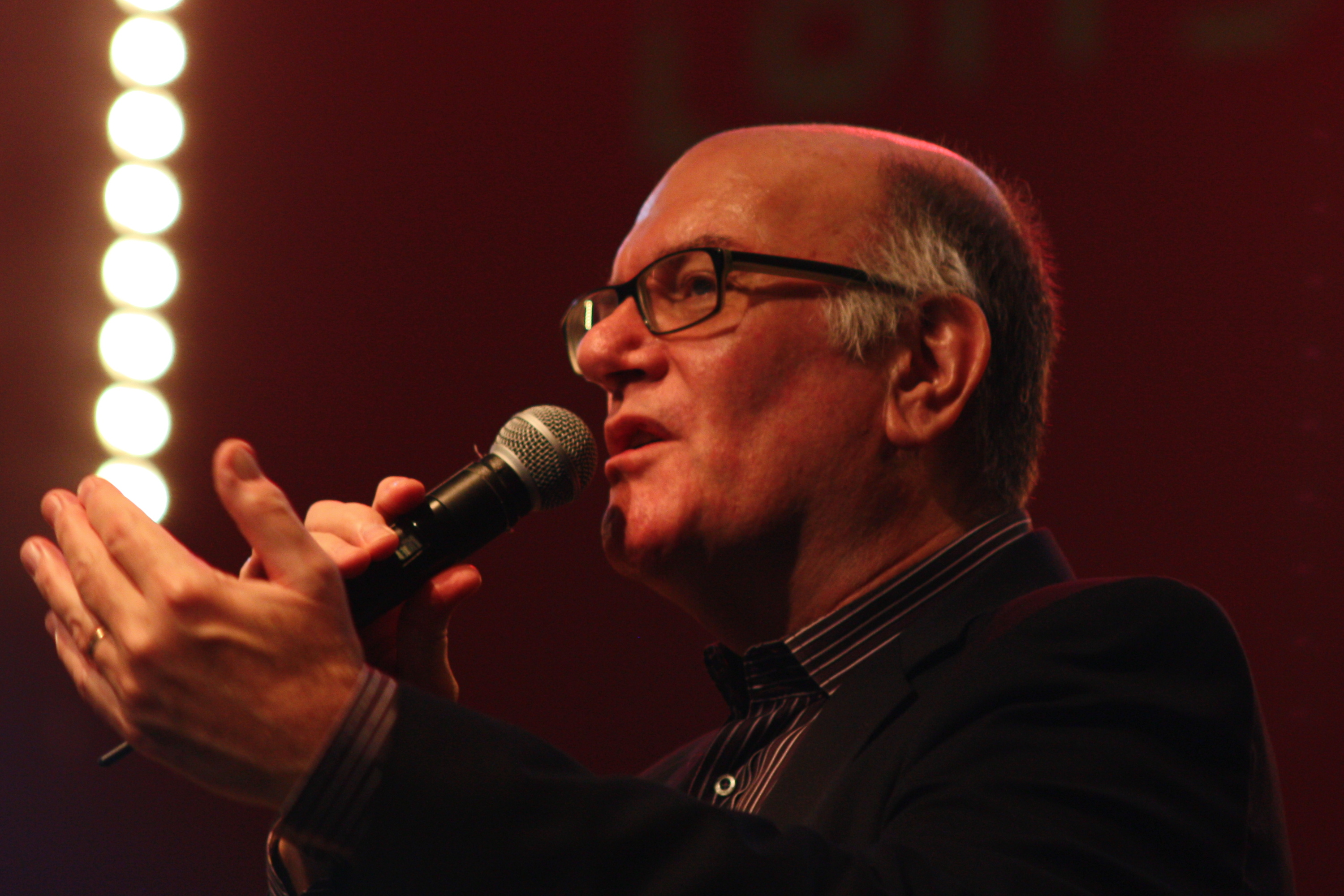 44. Deutsches Jazzfestival Frankfurt 2013: Jim McNeely der Bigband-Leiter der hr-Bigband